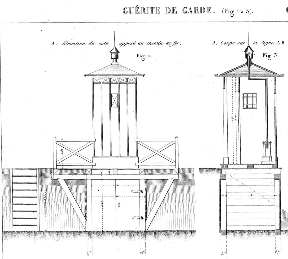 Chemin de fer de Strasbourg à Bâle - coupes d'une guérite pour garde le long de la voie.